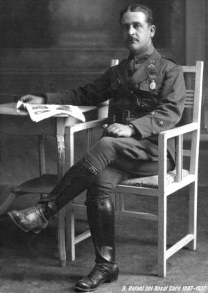 Rafael Rosal Caro cliche119Ch